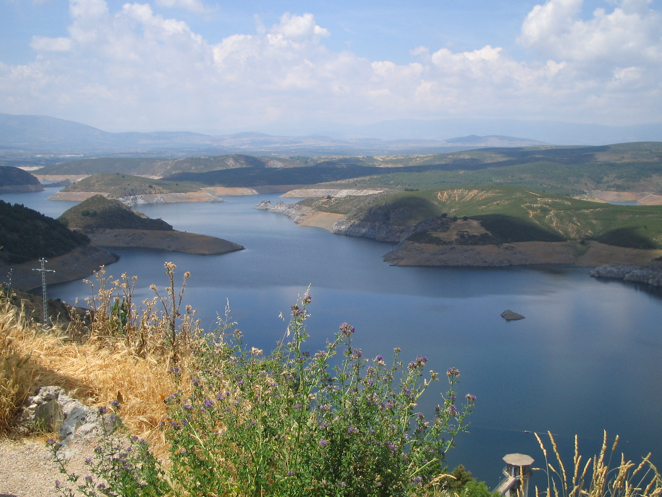 Presa del Atazar.